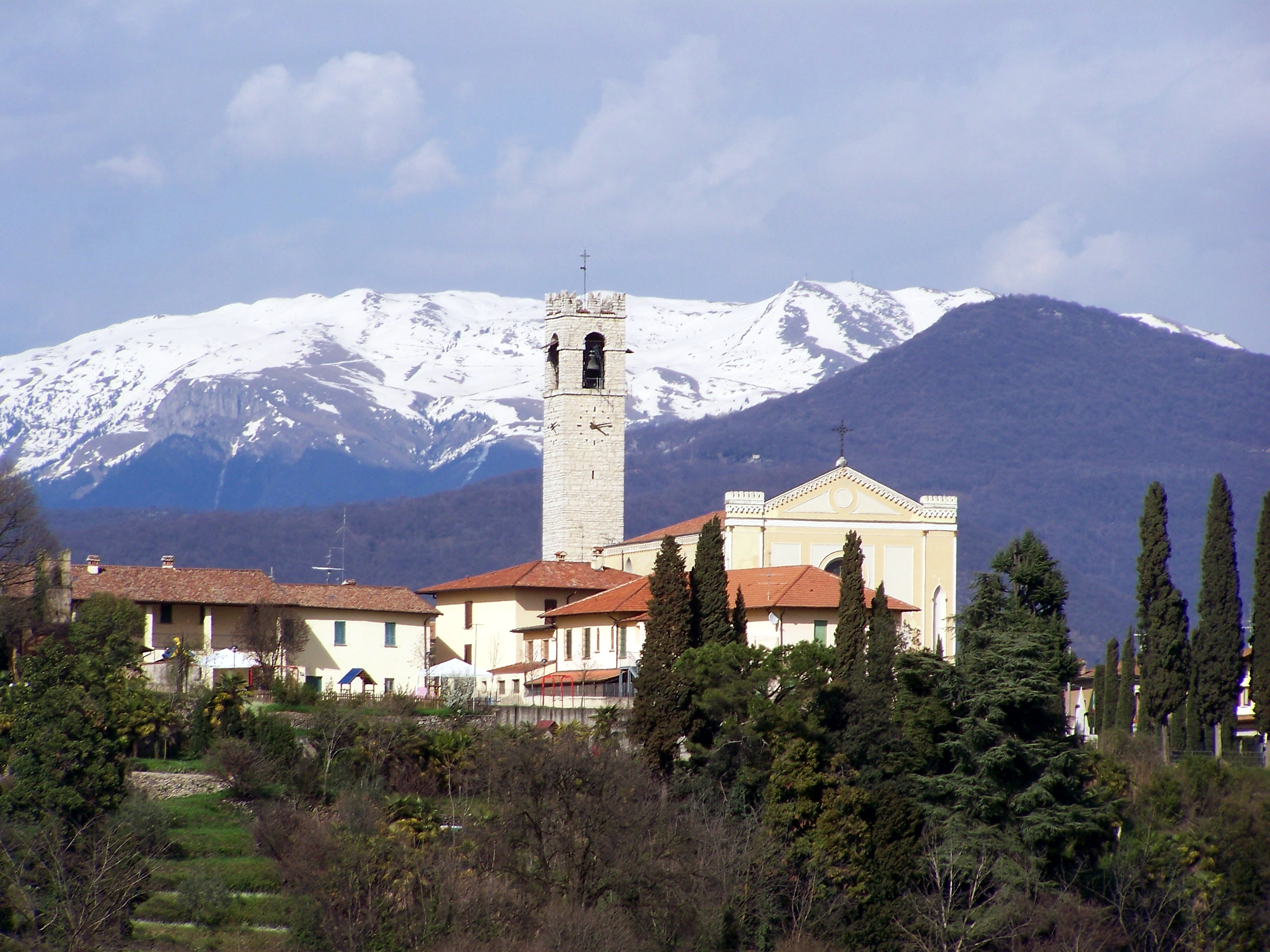 La Chiesa Parrocchiale di San Bartolomeo a Bornato, vista dalla frazione di Costa.